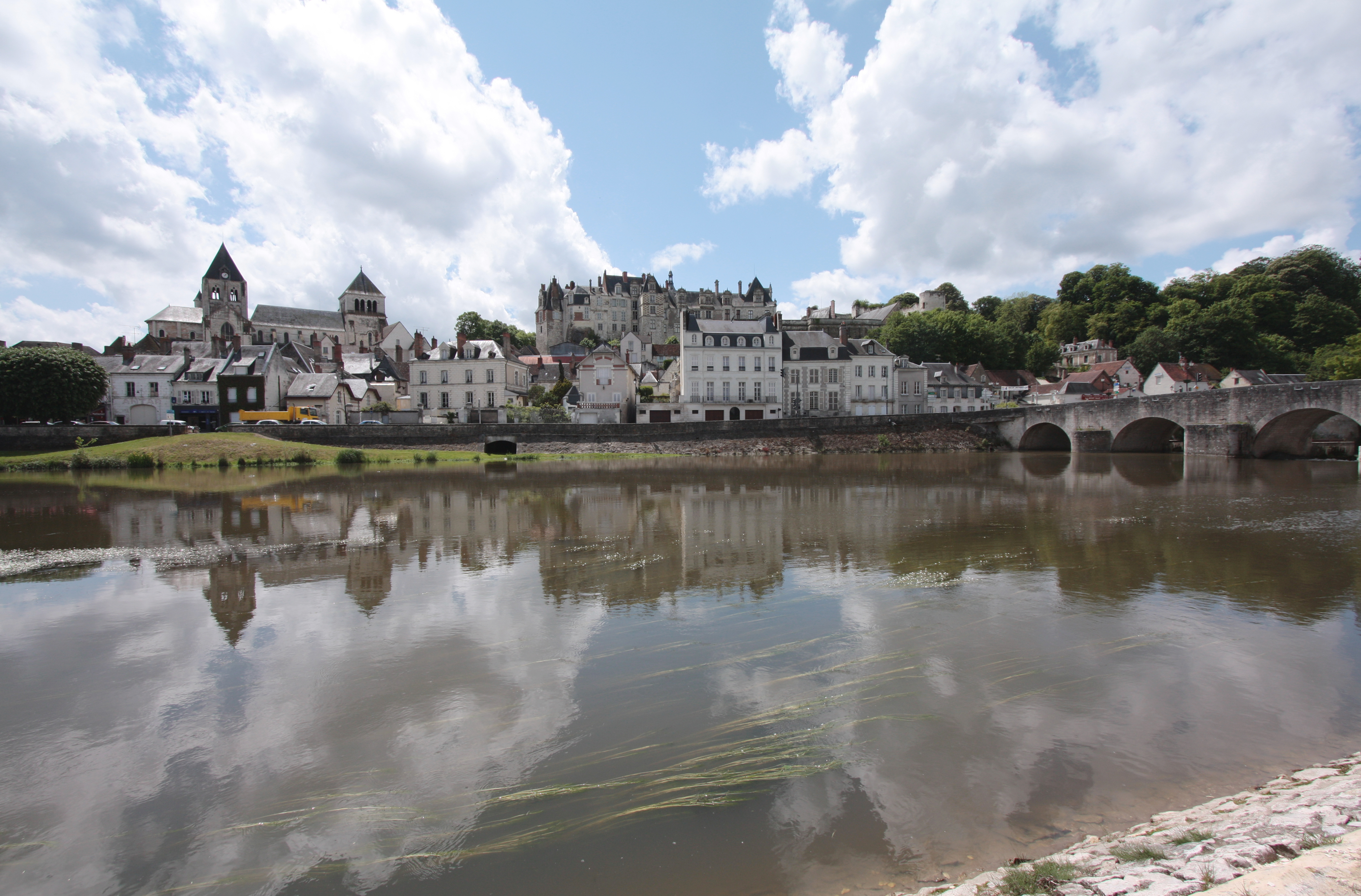 Schloss Saint-Aignan, Département Loir-et-Cher/Frankreich - Blick über die Cher auf Schloss und Stadt.